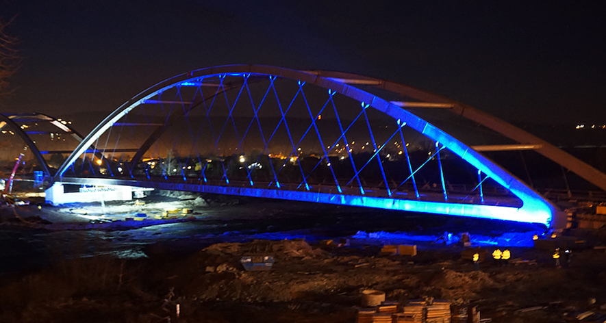 Nowa przeprawa, której oddanie zaplanowano na maj 2019 r.